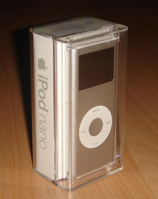 iPod nano 2Go dans sa boite d'origine